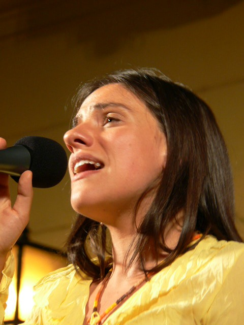 Palya Bea a Megyeháza udvarán tartott koncerten